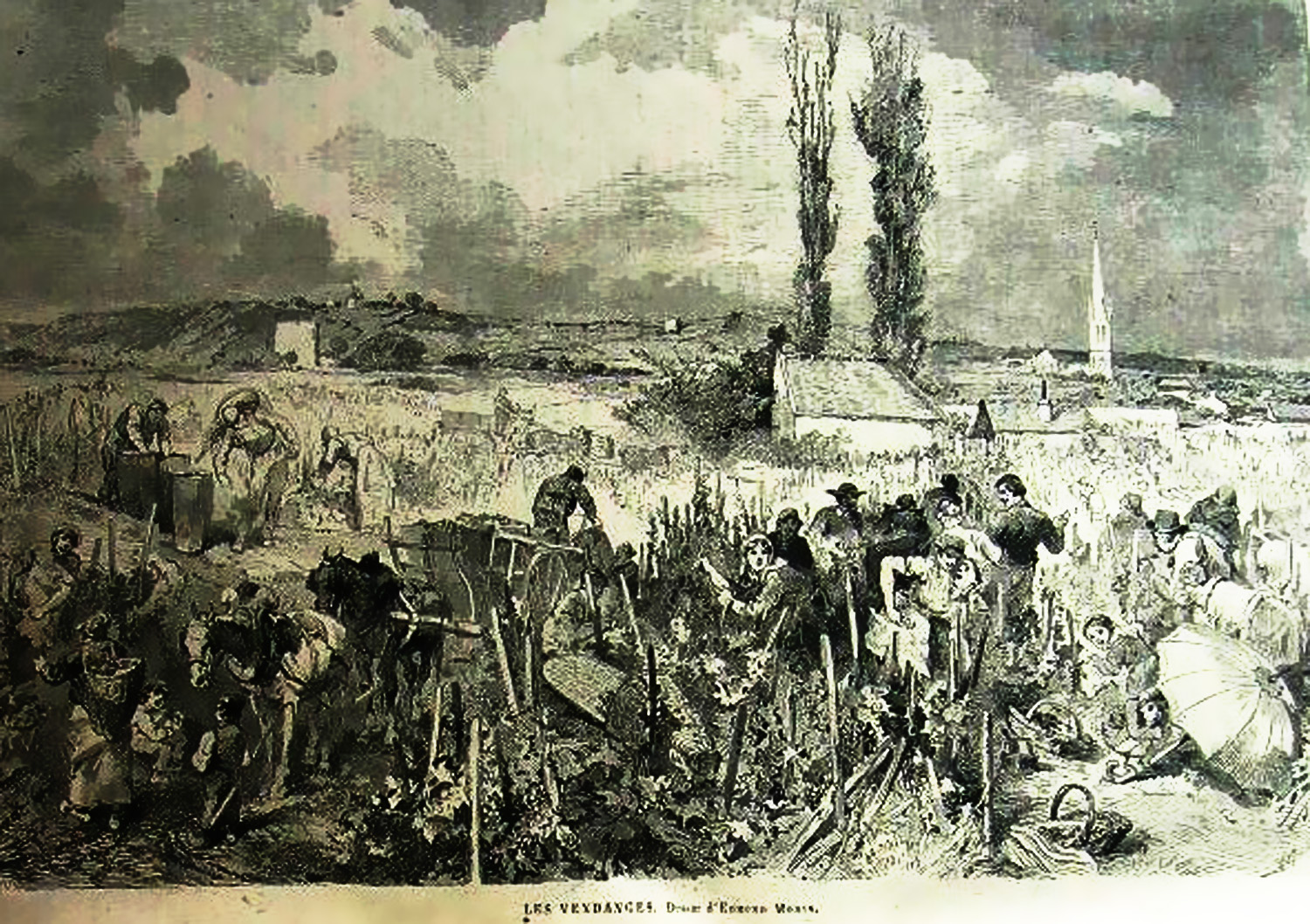 Les vendanges par Edmond Morin